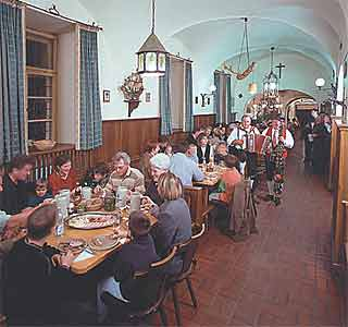 Hauseigenes Bräustüberl Aldersbach